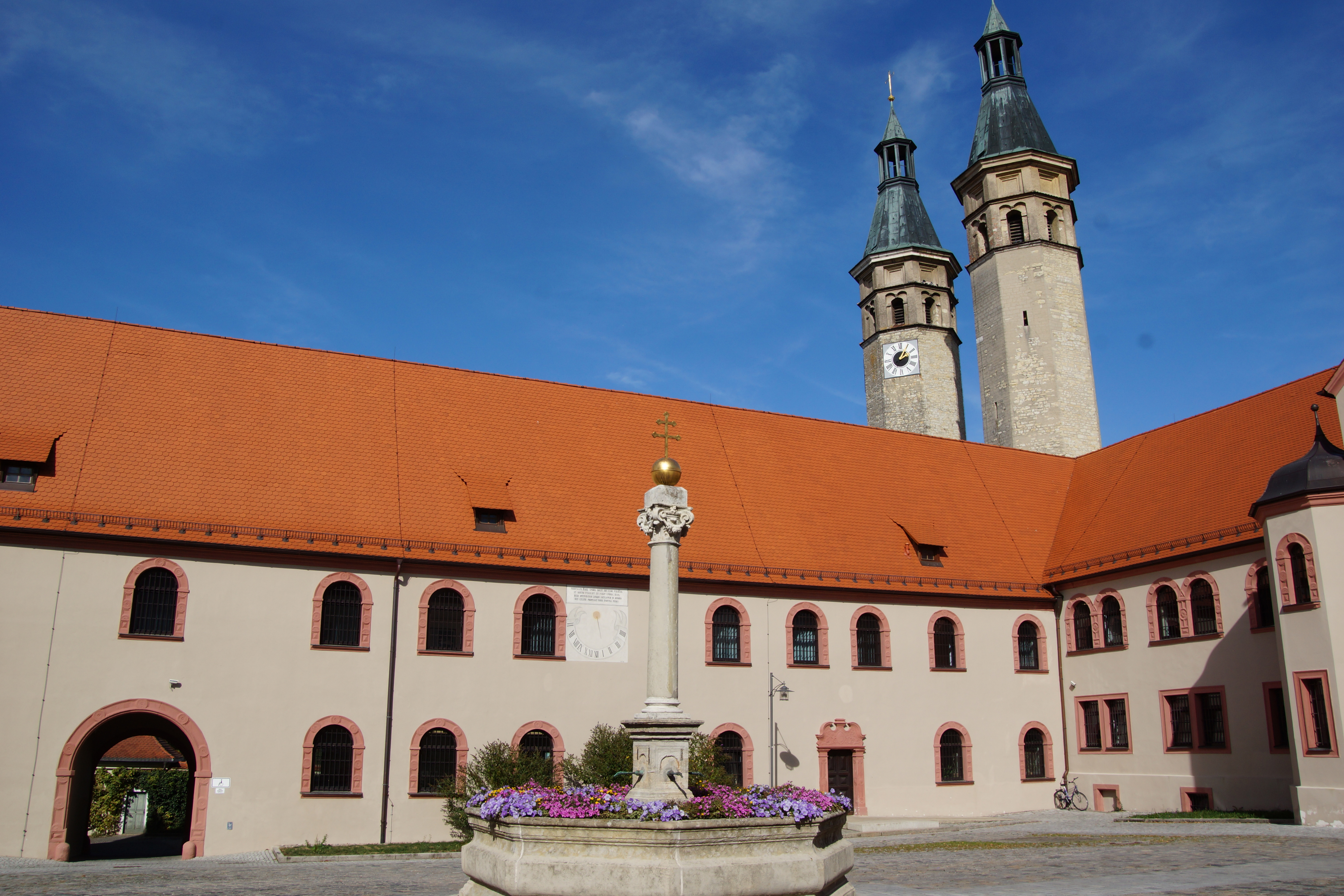 Das ehemalige Karthäuserkloster Prüll in Regensburg